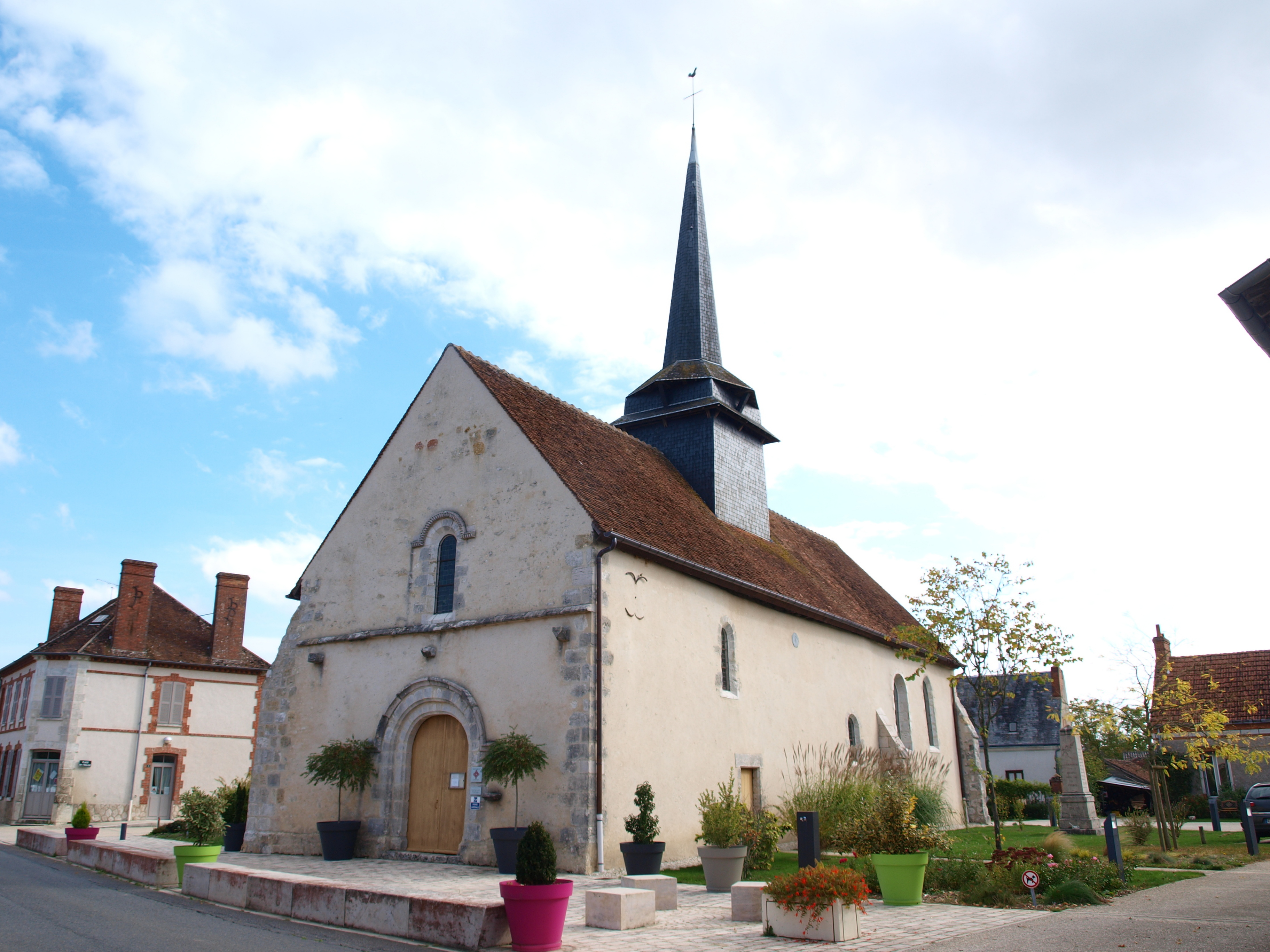 Église Saint-Louis de la Cour-Marigny (Loiret, France)